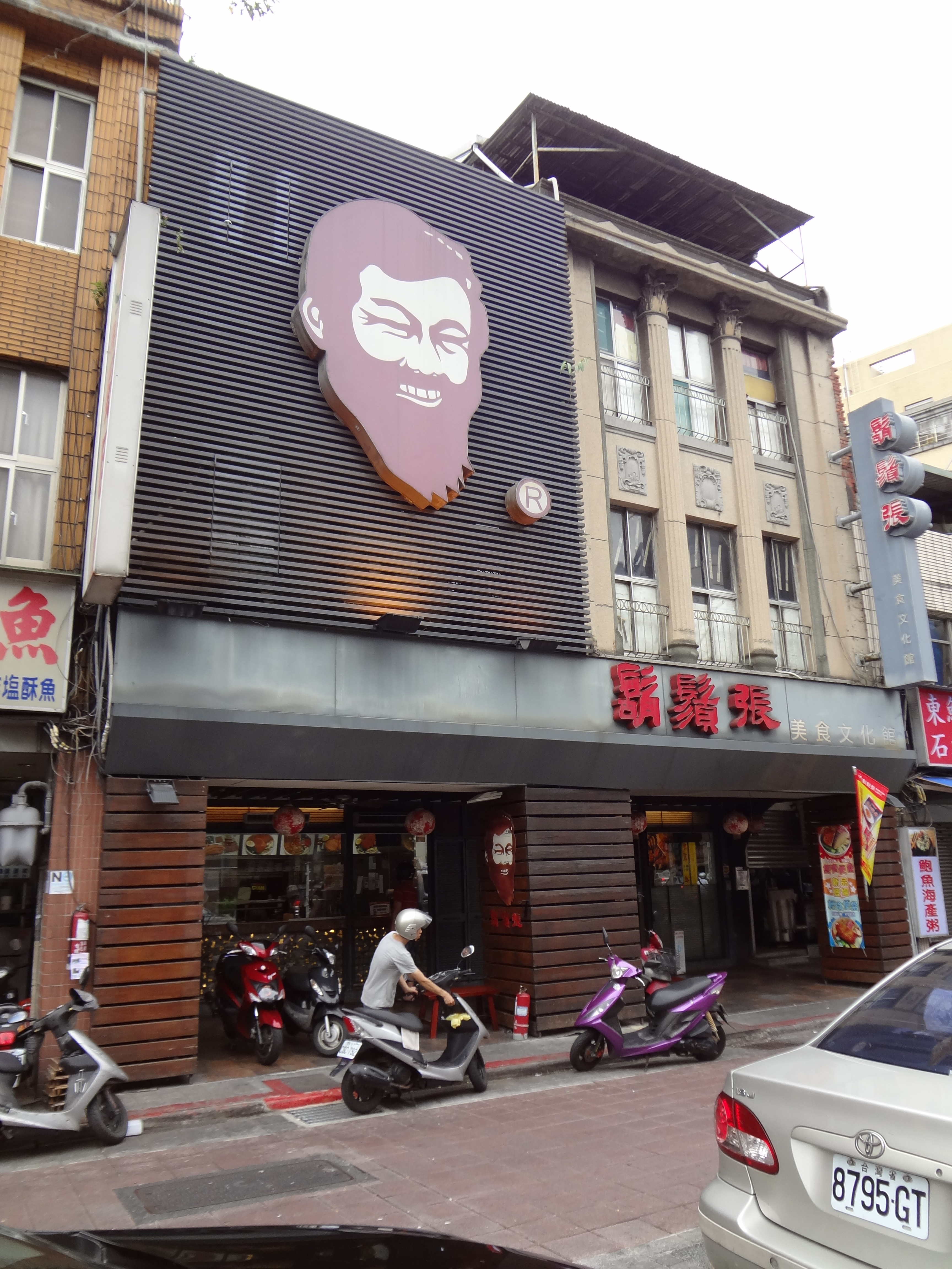 中文（台灣）: 鬍鬚張美食文化館，位於臺北市大同區寧夏路62號（原鬍鬚張臺北寧夏店）。